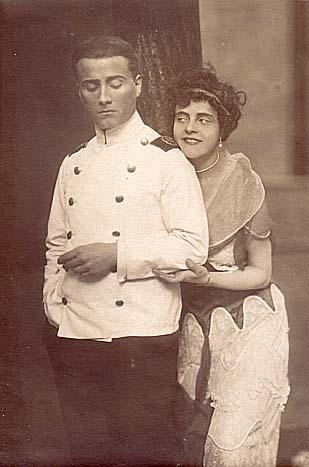 Hermann Thimig und Mady Christians in "Eifersucht", Kammerspiele